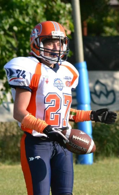 Luisa Camplone, eletta MVP della finale